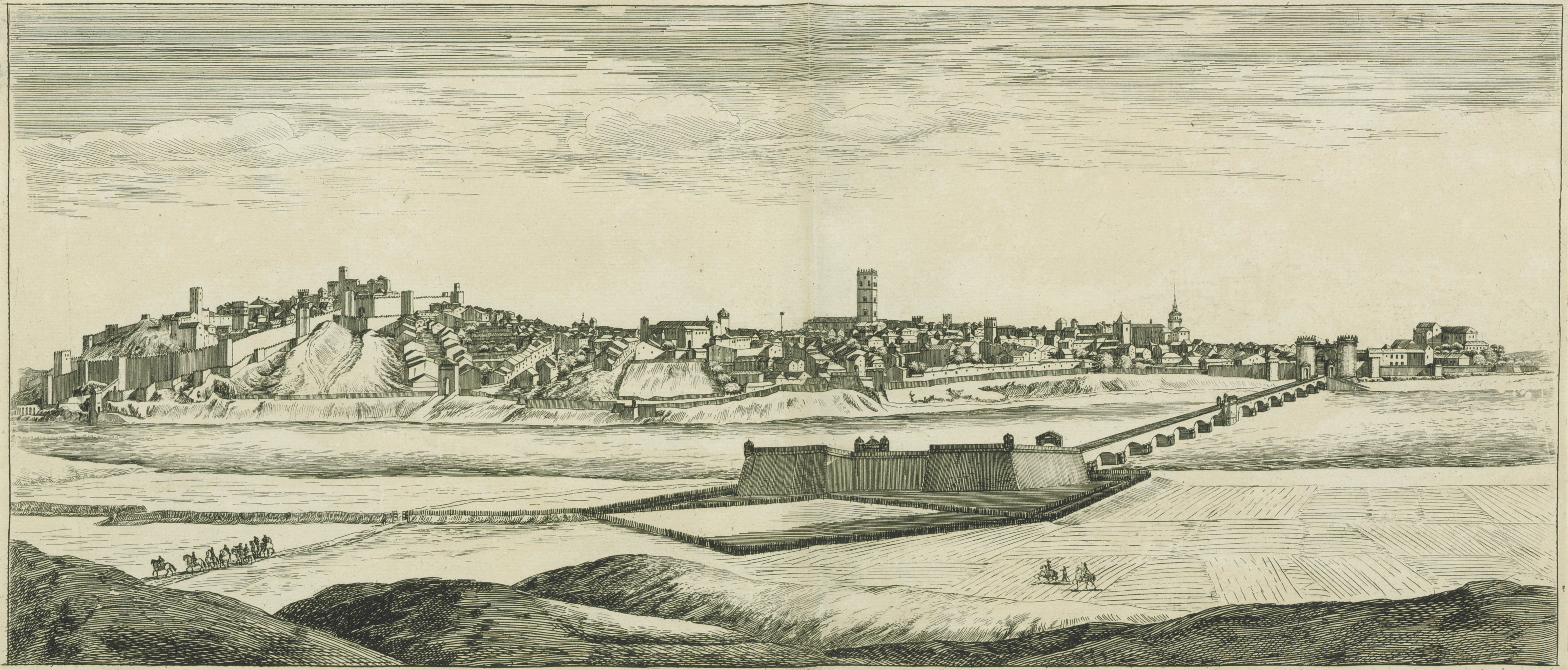 Profil de la ville de Badajoz en Espagne.